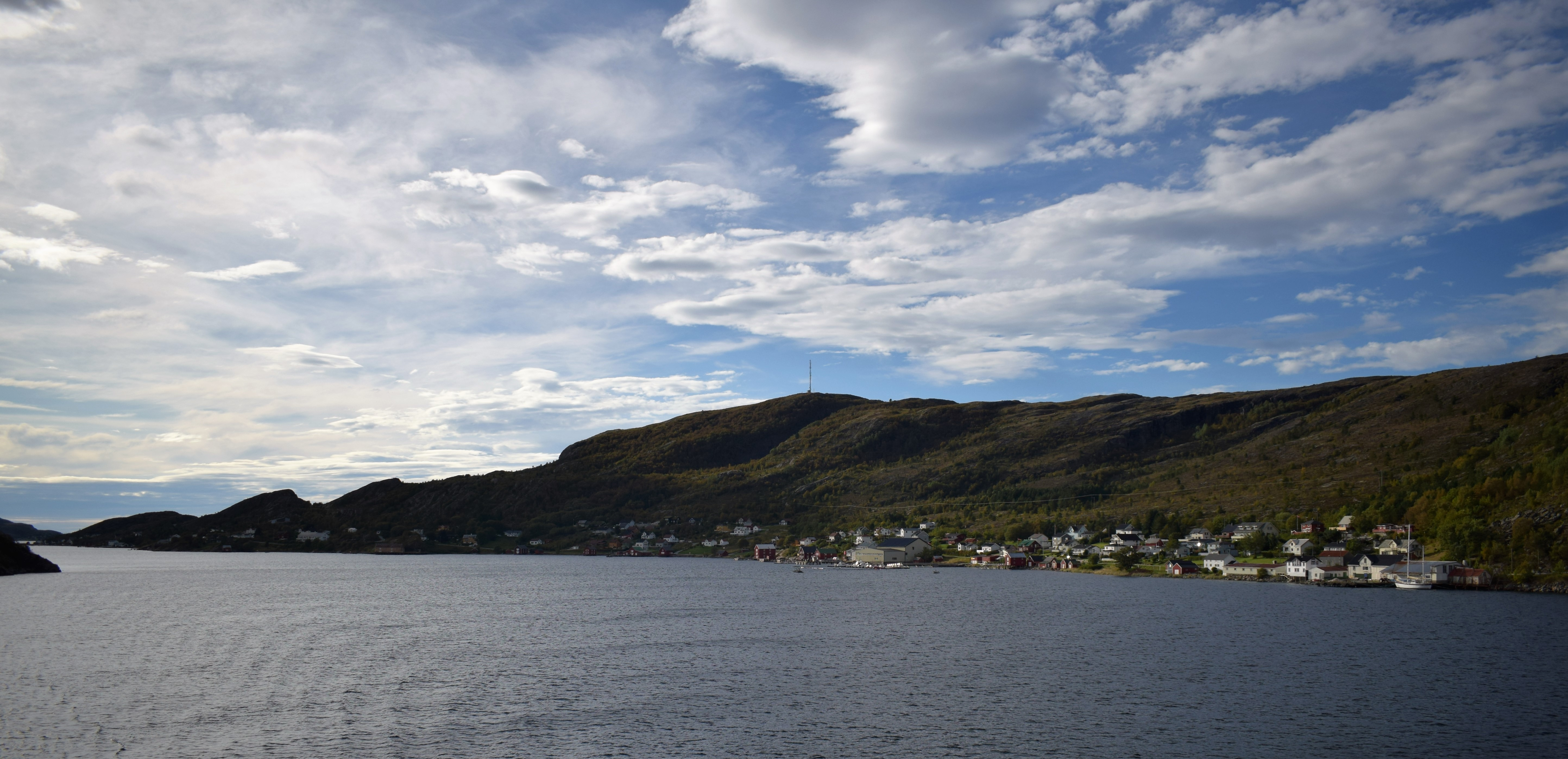 Harsvika i Stoksund i Åfjord kommune, sett fra sjøen.